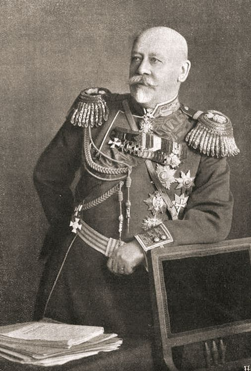 Владимир Александрович Сухомлинов, военный министр, генерал-от-кавалерии, генерал-адъютант.